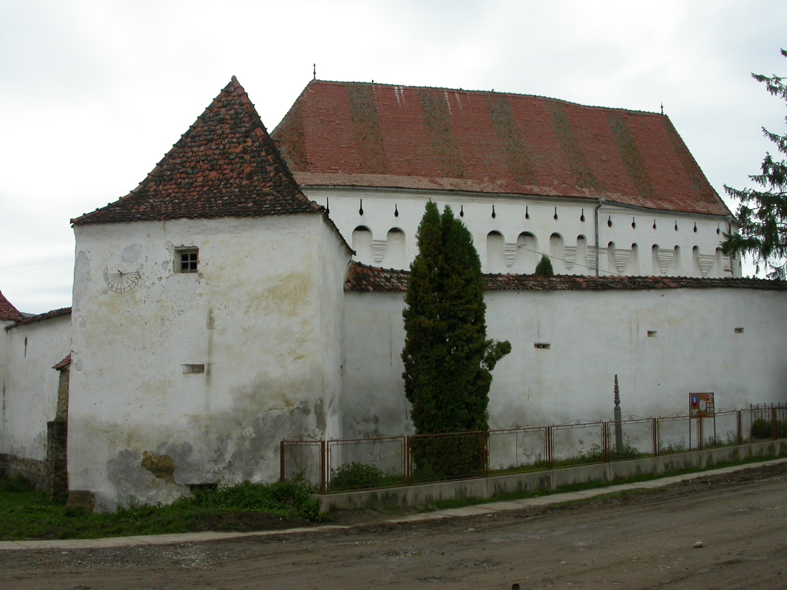 Ansamblul bisericii unitariene fortificate, sec. XV - XVIII